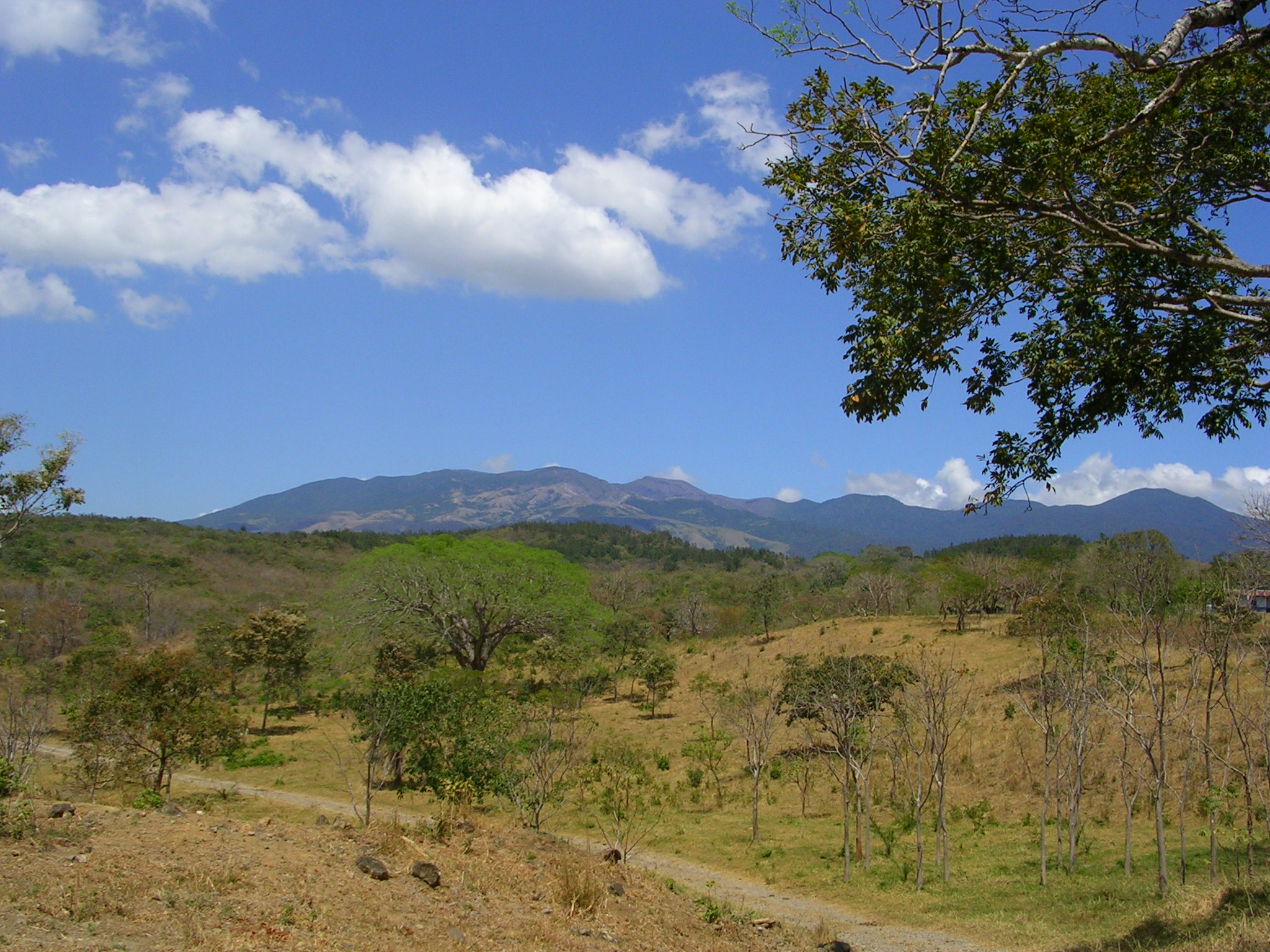 Vulkan Rincon de la Vieja/Costa Rica